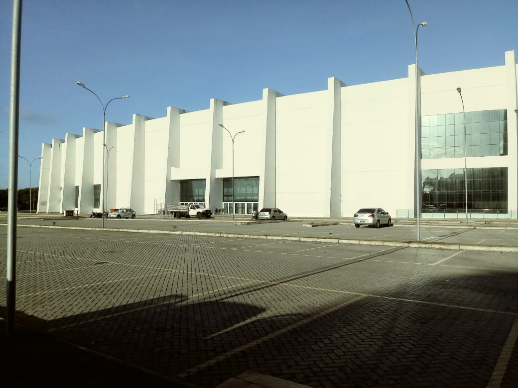 Pavilhão de Congressos e Convenções do Centro de Convenções Poeta Ronaldo Cunha Lima, João Pessoa